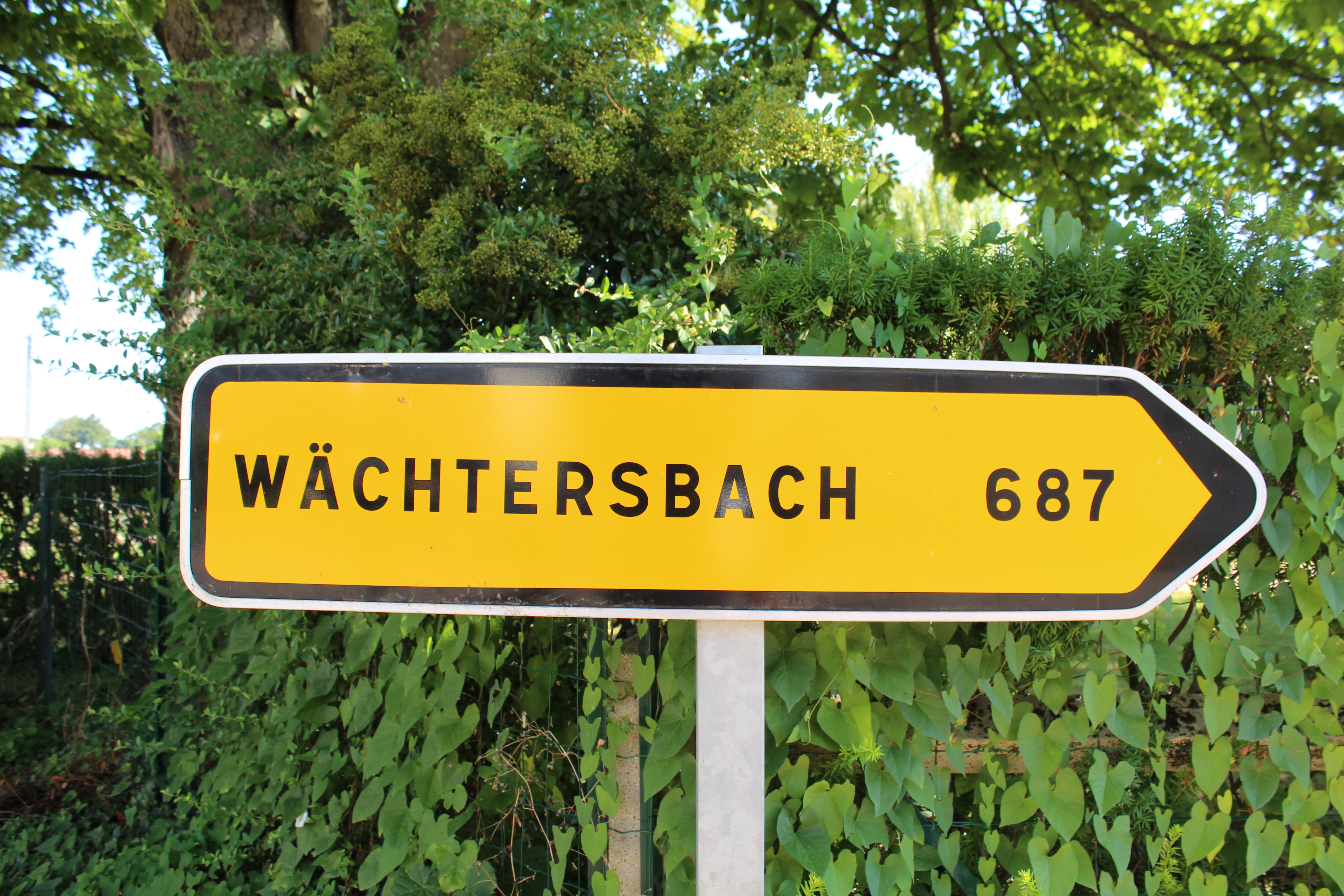 Panneau indiquant la direction et la distance pour aller à Wächtersbach depuis Vonnas.